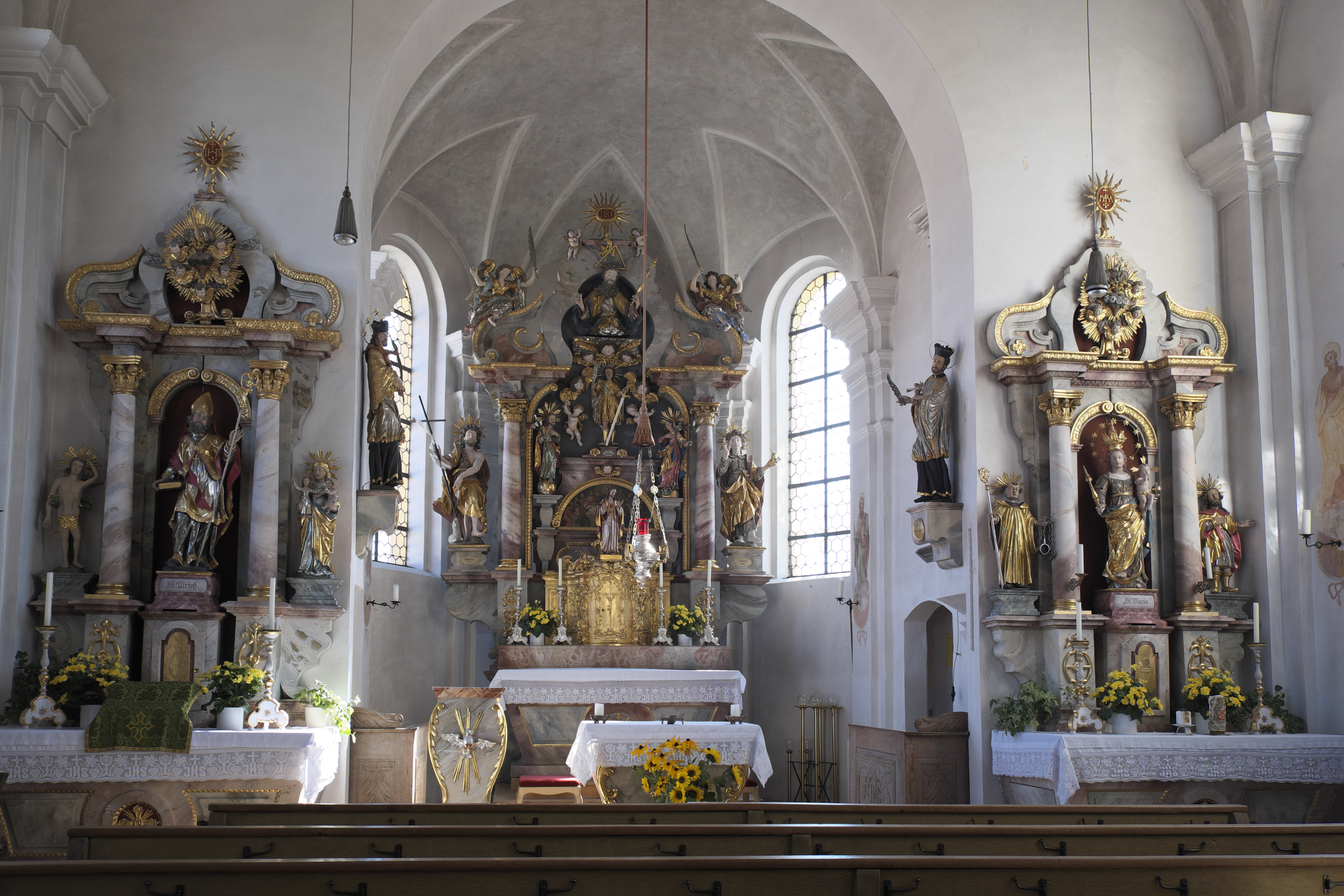 Katholische Filialkirche St. Pankratius in Ramsach (Penzing) im Landkreis Landsberg am Lech (Bayern/Deutschland), Innenraum